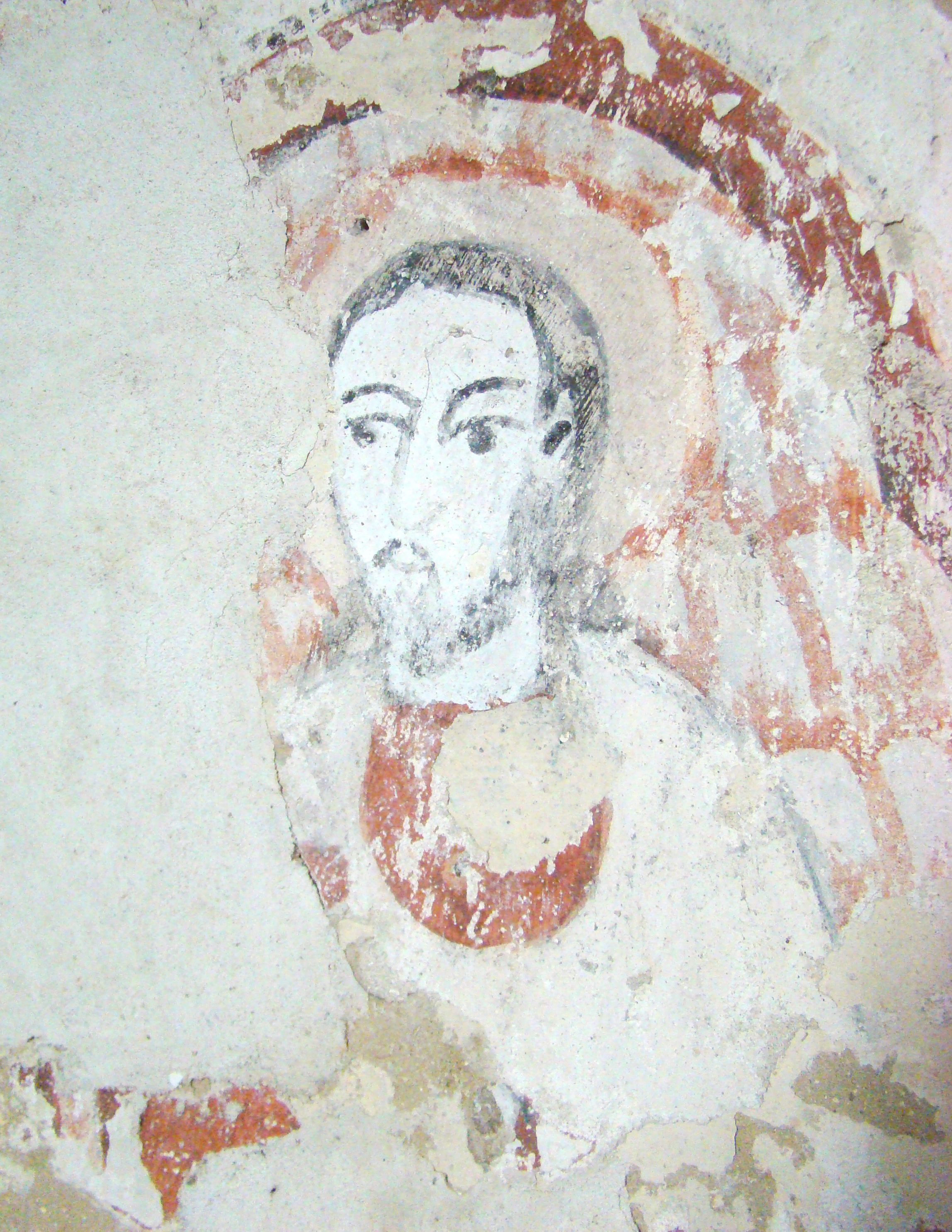 Biserica "Adormirea Maicii Domnului" a mănăstirii Vadului , sat Vad, județul Cluj